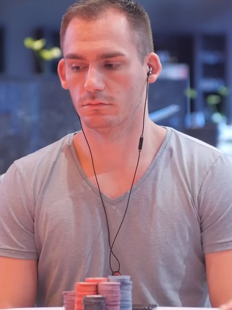 Justin Bonomo bei der WPT Amsterdam